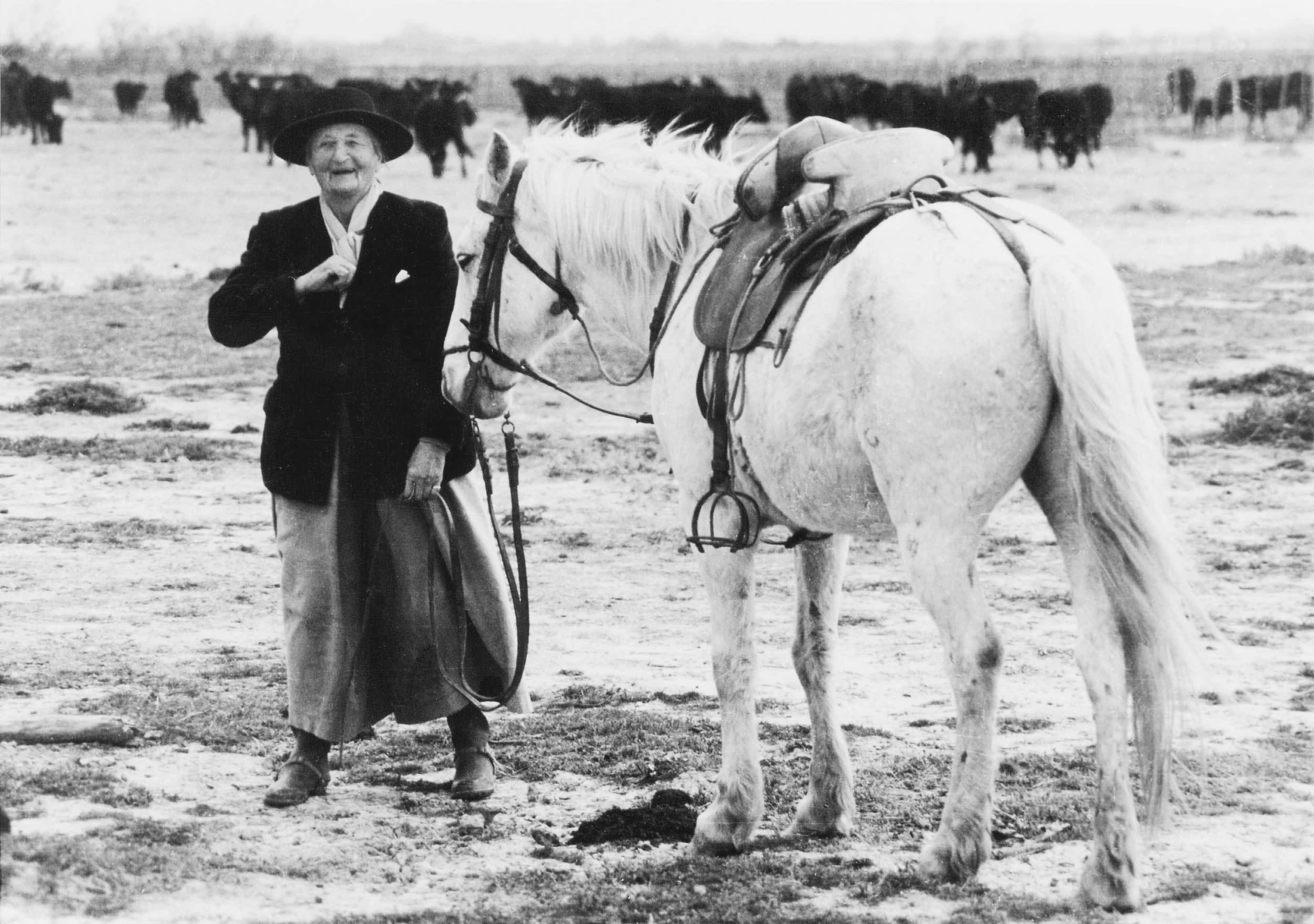 Mademoiselle Fanfonne (la Grande Dame de Camargue) vient de trier une course de taureaux qui vont aller combattre les raseteurs dans une arène du Midi en course Camargaise. Le soir, après le spectacle, les six cornupèdes reviendront aux pâturages de Signoret. Elle est avec sa monture Tamarisse.